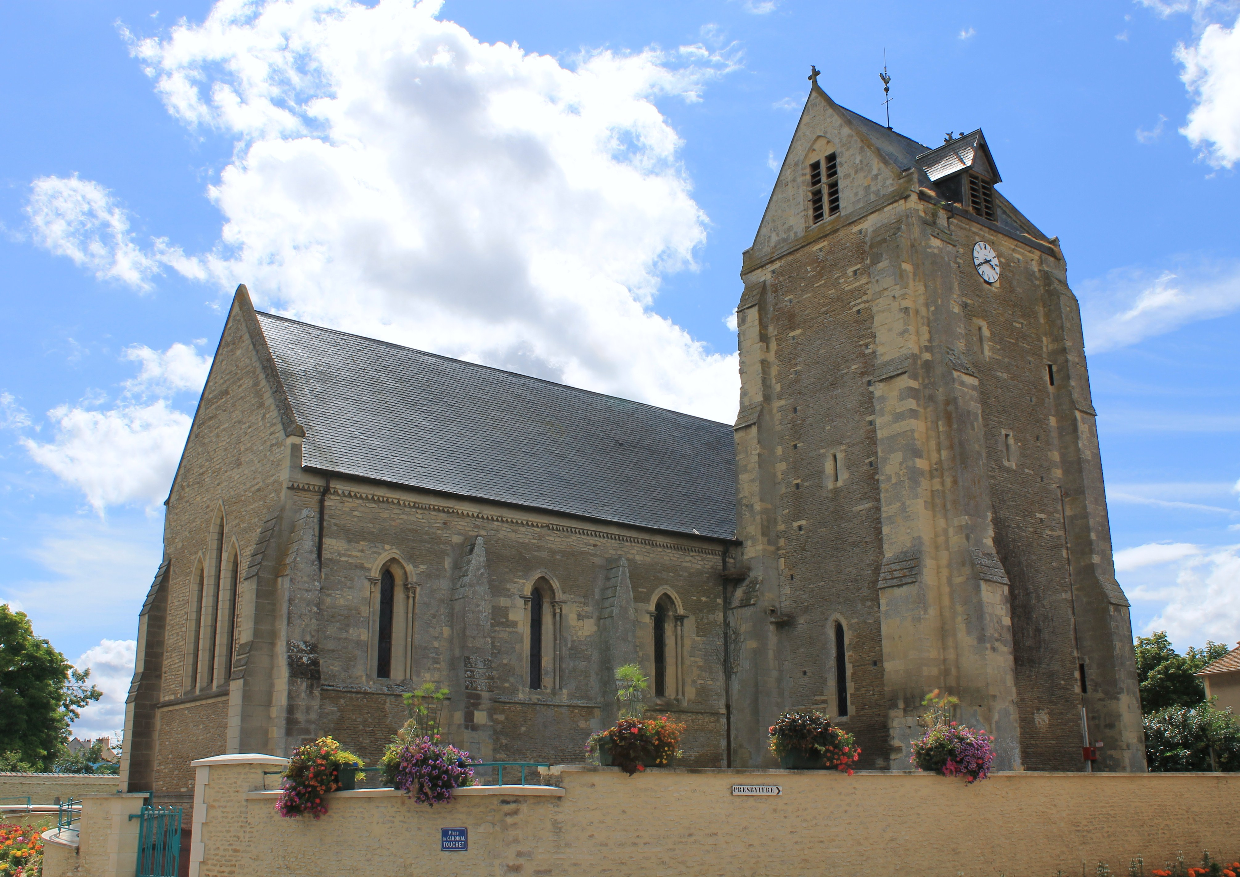 Eglise Saint Vigor du XIIIème siècle à Soliers (Calvados)